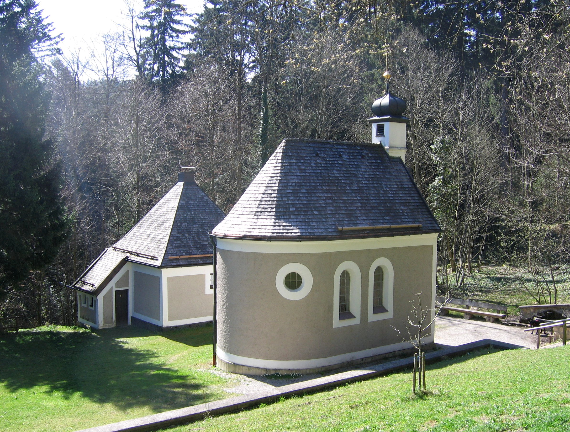 Auf dem Taubenberg, Nüchternbrunn; Wallfahrtskapelle, erbaut 1664, Klause 1794. D-1-82-136-65